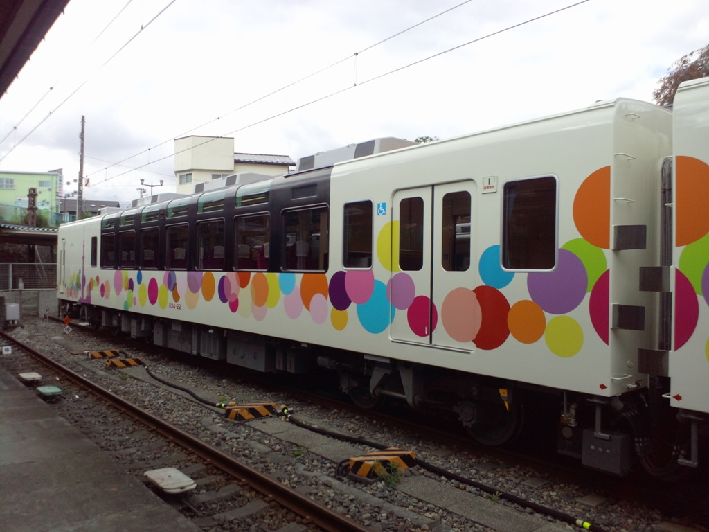 東武鉄道634型「スカイツリートレイン」 クハ634-21 2012年10月27日 東武日光駅にて撮影